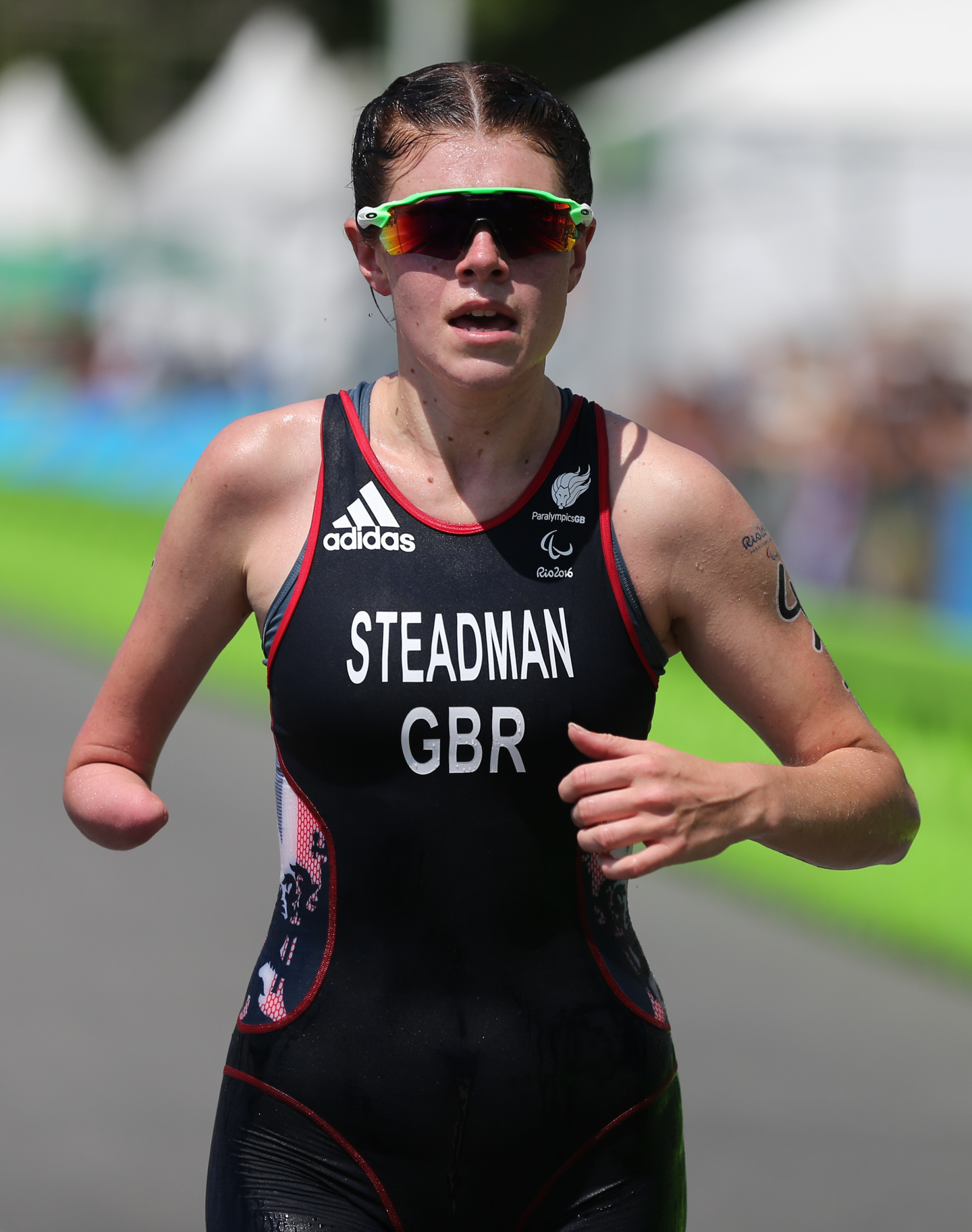 Rio de Janeiro - Provas de triatlo feminino PT4, PT2 e PT5, em Copacabana. Competição da categoria PT5. (Tânia Rêgo/Agência Brasil)